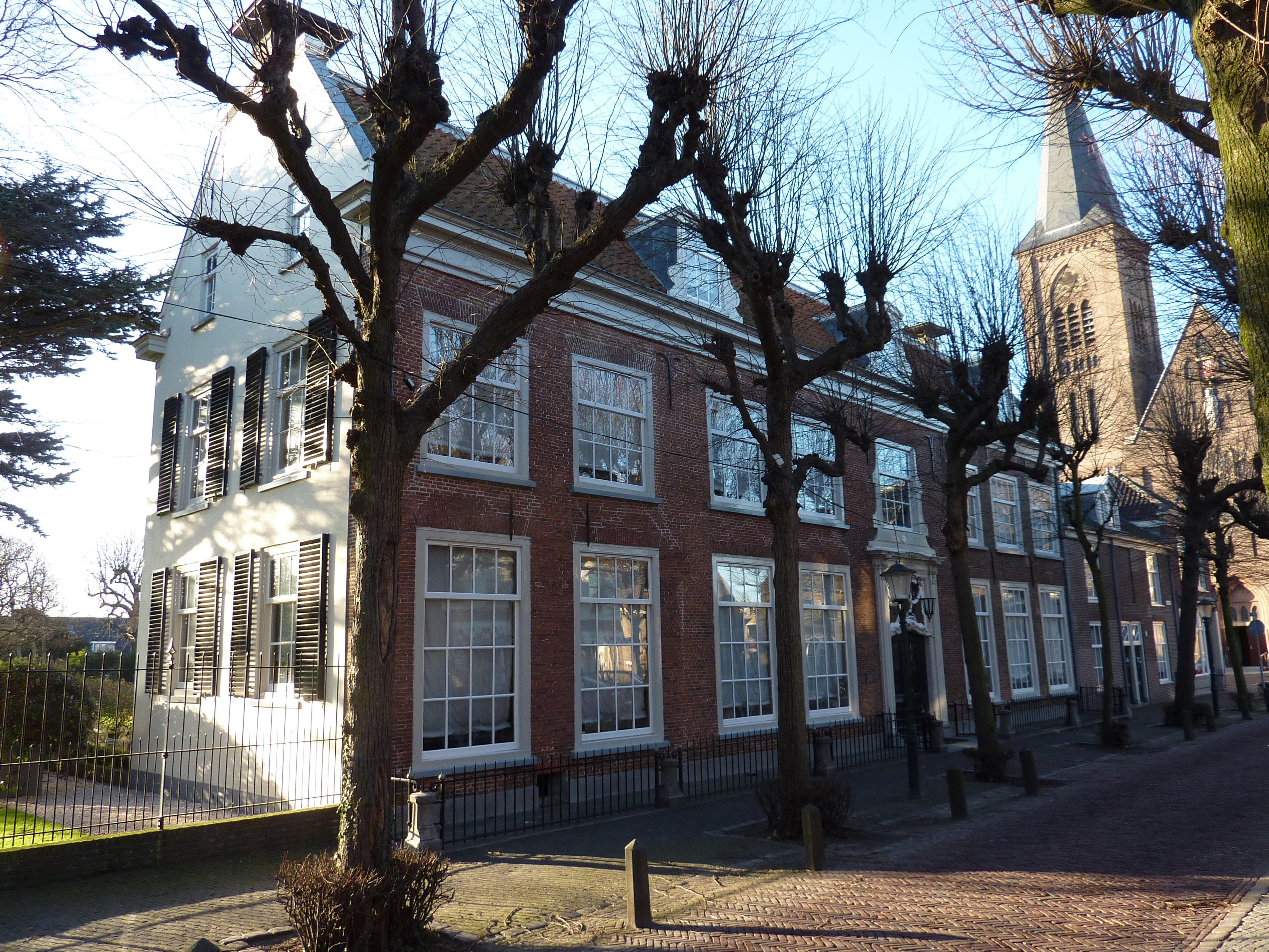 Noordwijk, Lindenplein 1, huis van acht ramen breed